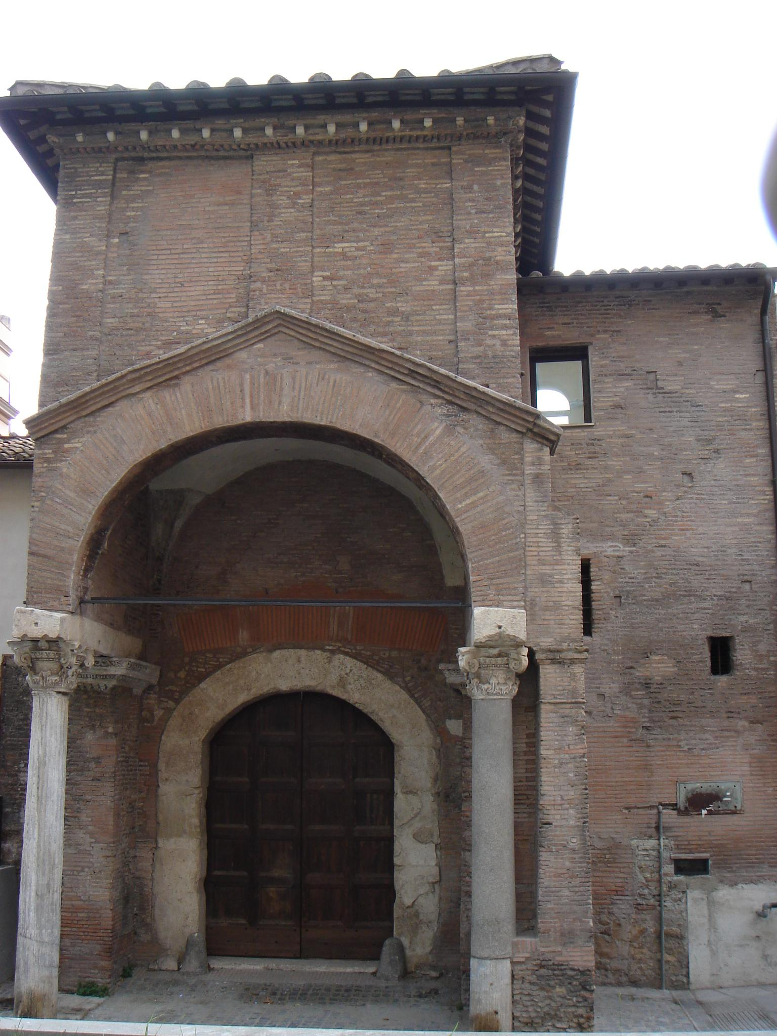 Roma, Trastevere: san Cosimato